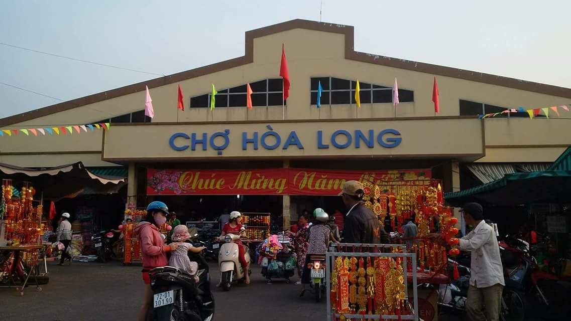 Chợ Hòa Long, Bà Rịa, Bà Rịa-Vũng Tàu